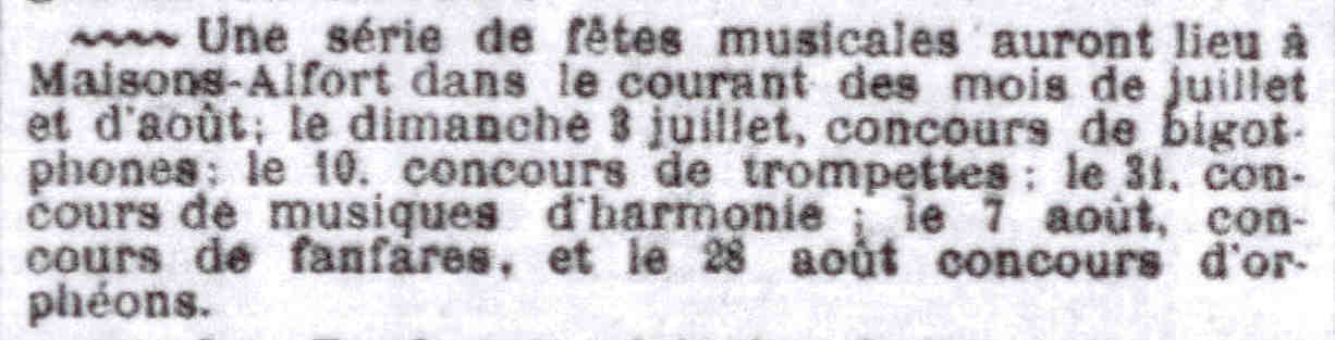 Extrait de la rubrique Courrier Orphéonique du journal Le Petit Parisien, 21 juin 1892, page 3, 3ème colonne. Annonce de fêtes musicales à Maisons-Alfort en banlieue de Paris.